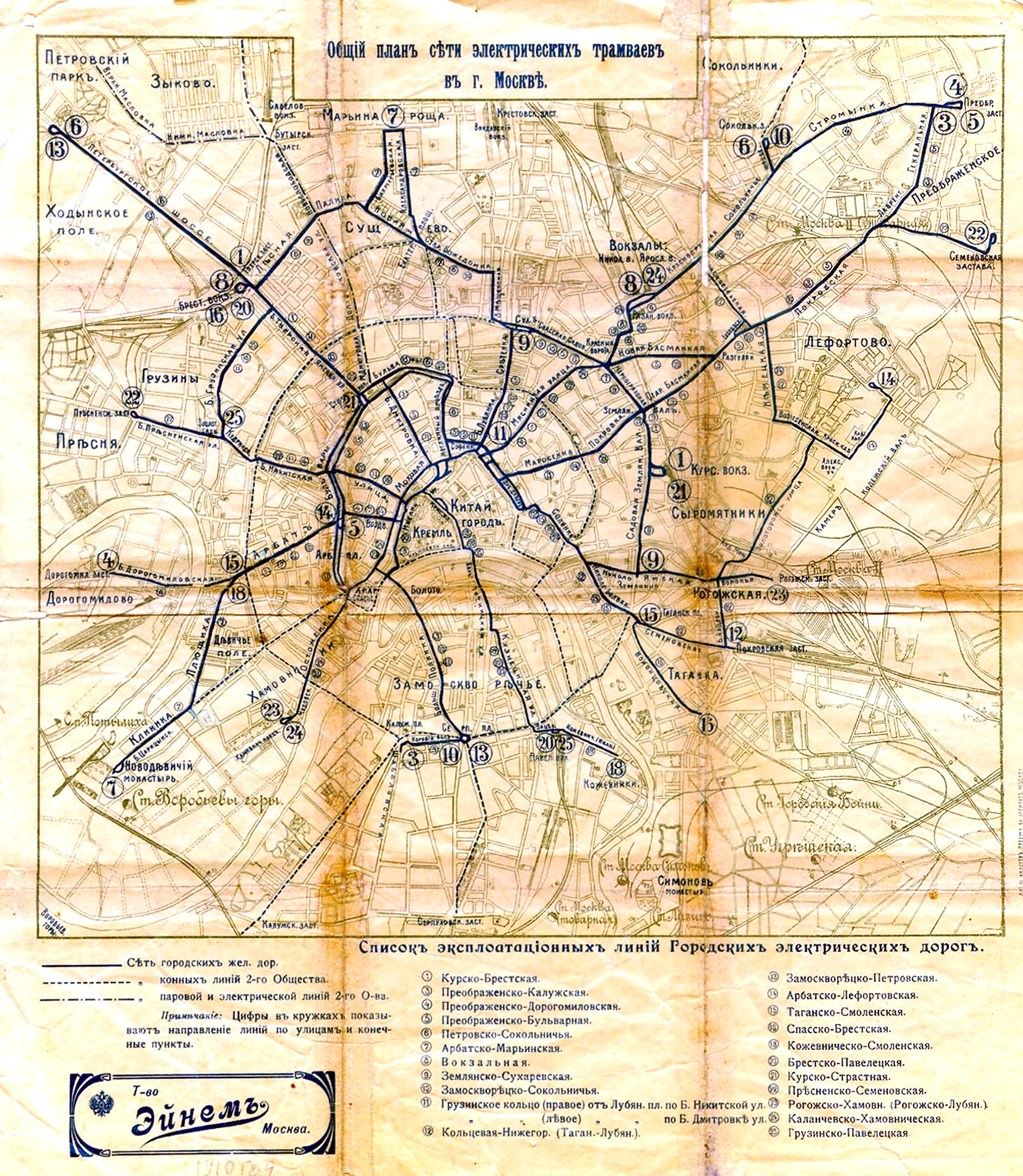 Общий план сети электрических трамваев в городе Москве в 1910 году.